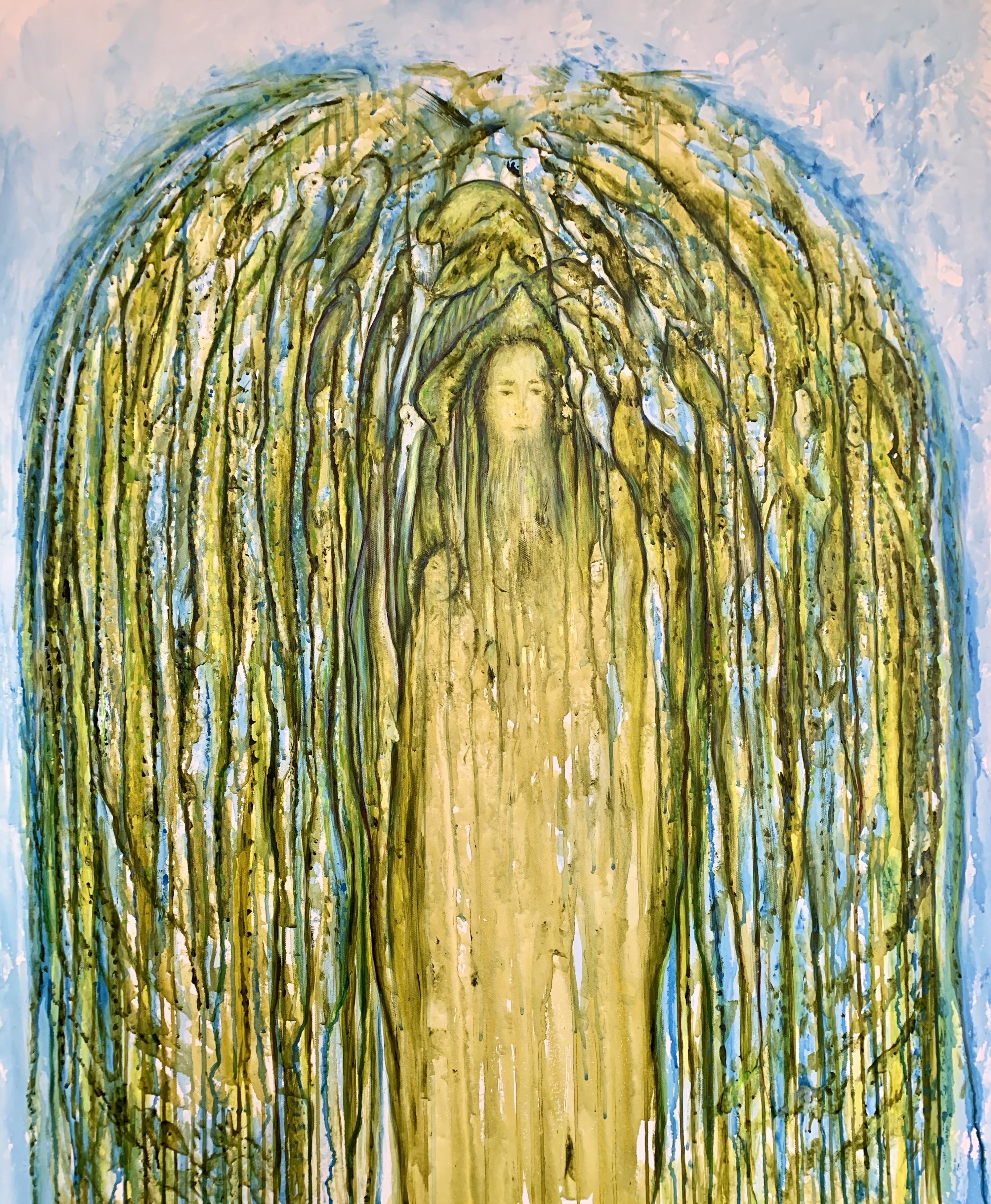 Gemälde von Prof. Ströter-Bender